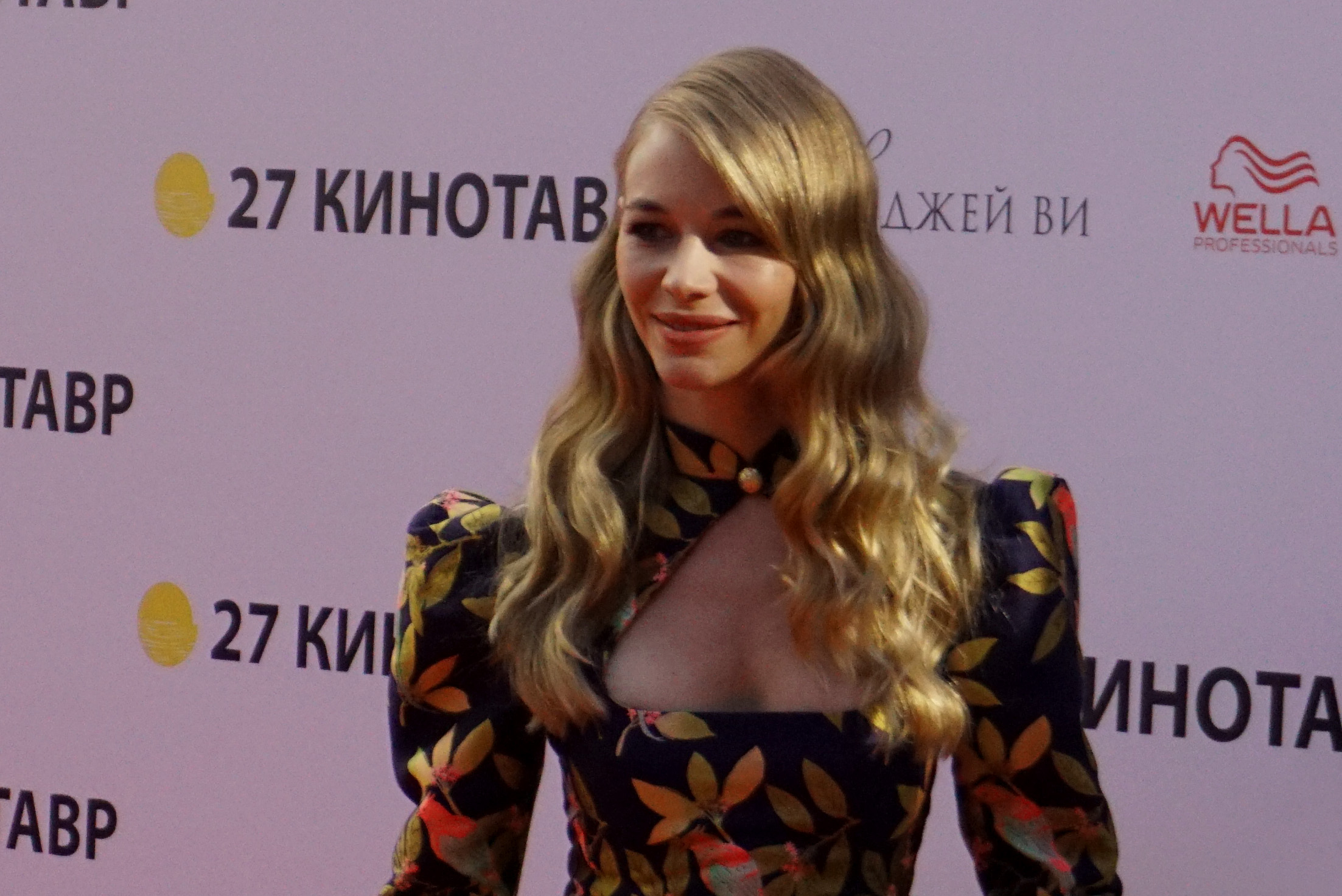 Светлана Владимировна Устинова (род. 1 мая 1982, Северодвинск) российская киноактриса на кинофестивале Кинотавр. Сочи, 2016.